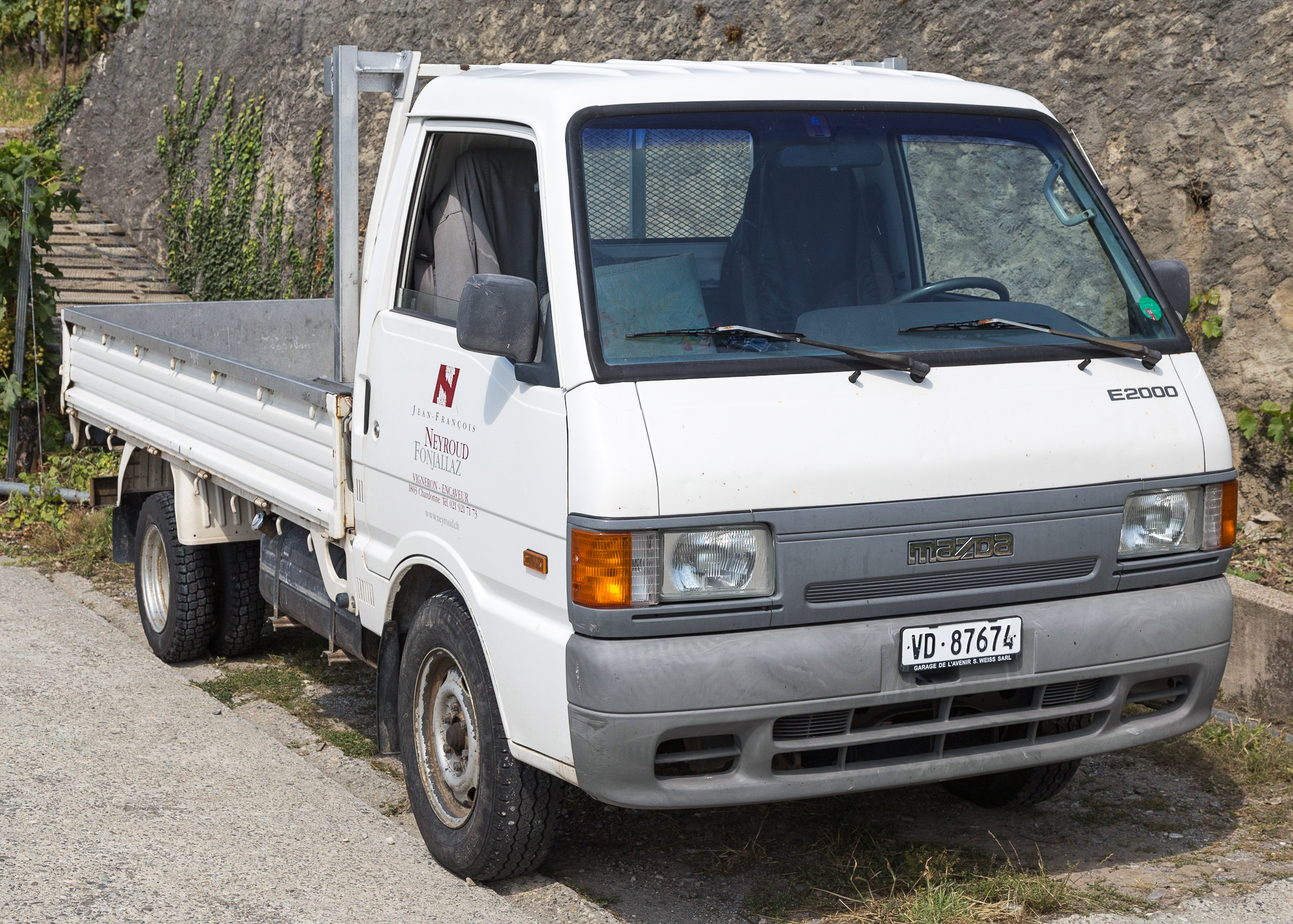 Mazda (Bongo) E2000, genutzt von einem Winzer im Lavaux